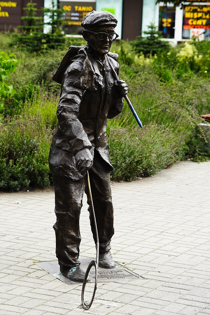 Szymon Gięty pomnik w Gorzowie Wielkopolskim